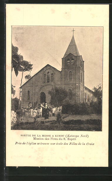 Sortie de la messe dominicale à l'église (aujourd'hui cathédrale) de la mission de Kindu (Katanga) tenue par les Pères du Saint-Esprit. Vers 1925.